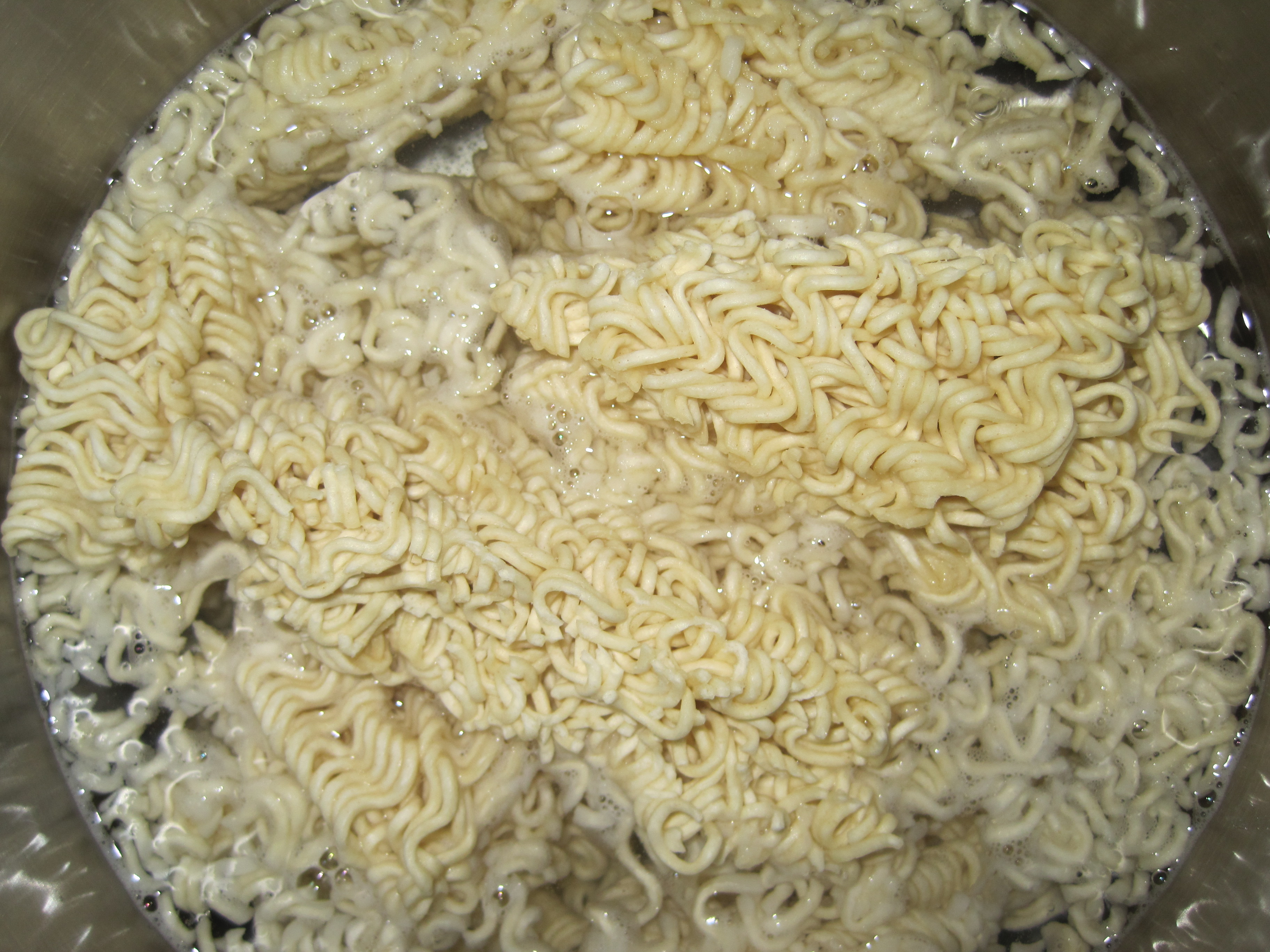 Top Ramen cooking